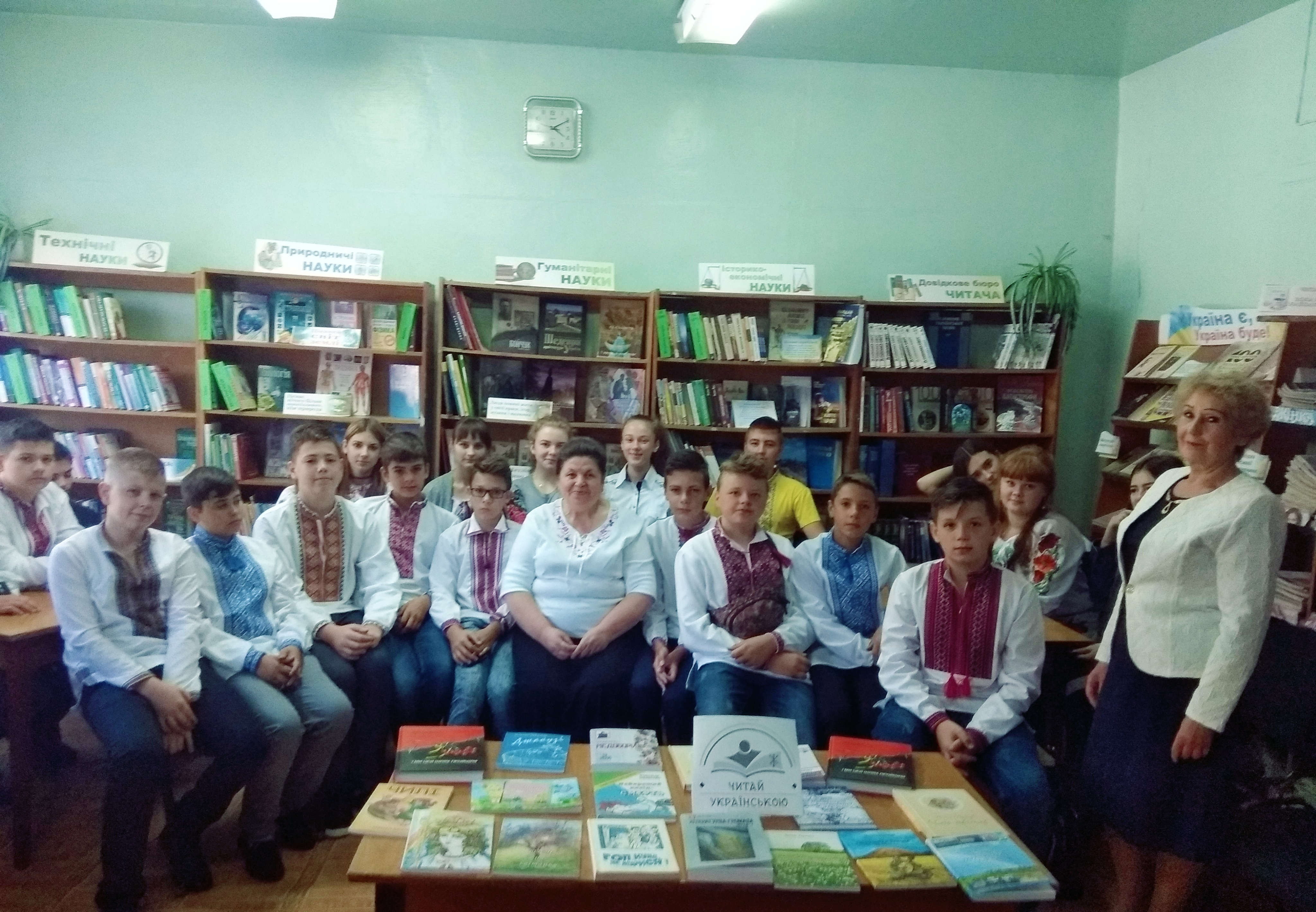 Читальний зал